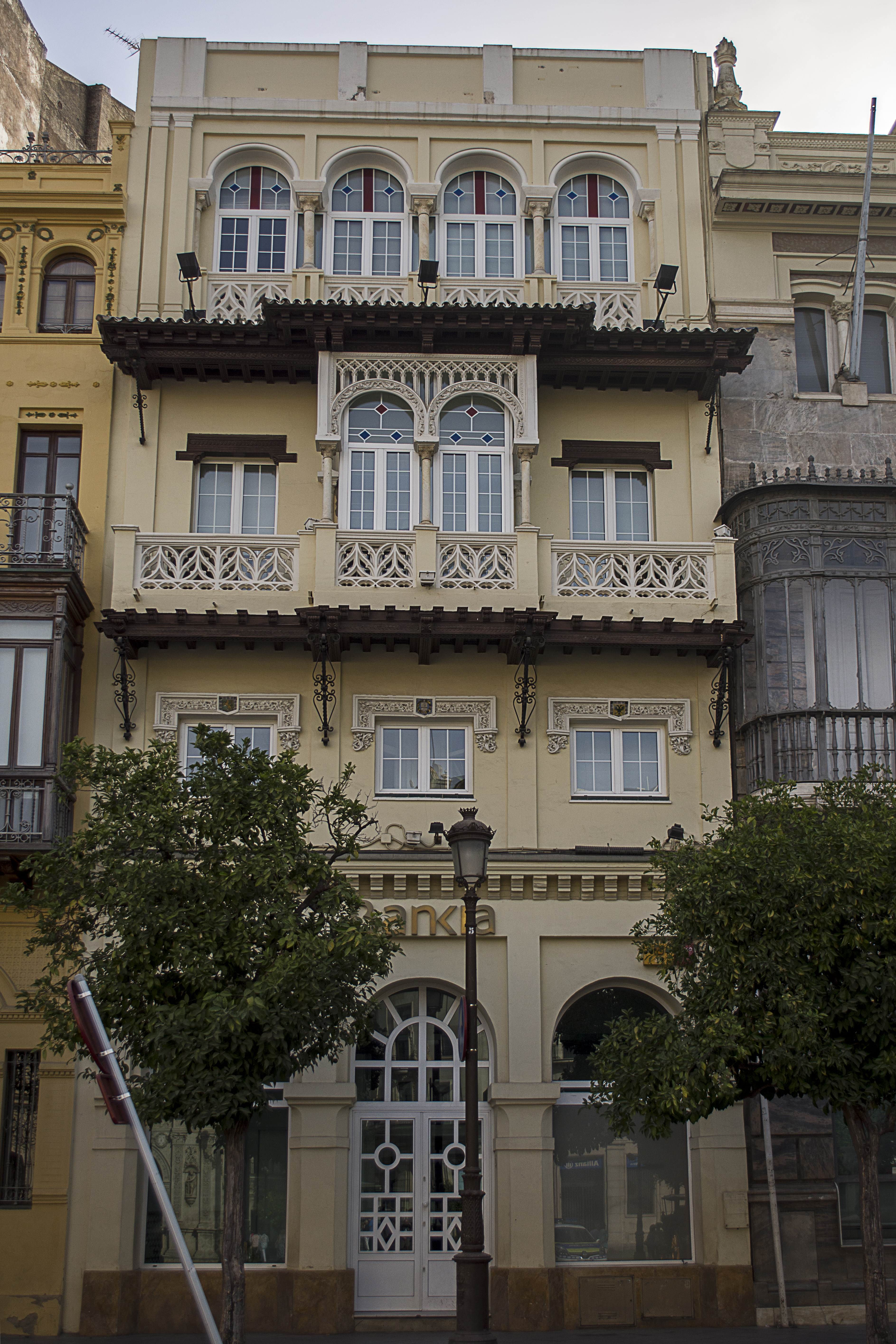 Casa de María Cháfer en la plaza de San Francisco nº11, Sevilla. Arquitecto Juan Talavera y Heredia (1914).